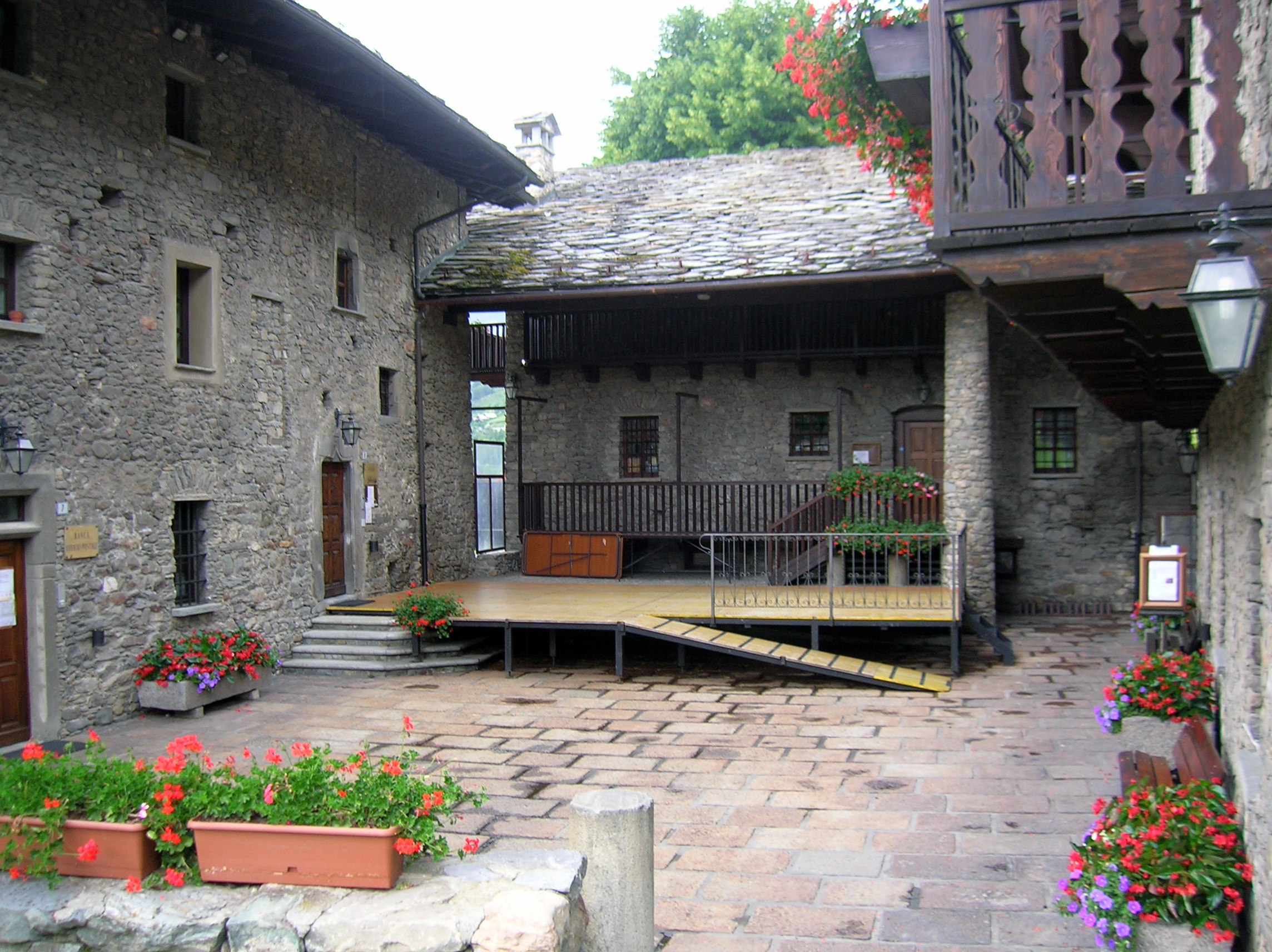 Maison Gerbollier, La Salle, Valle d'Aosta, Italia.